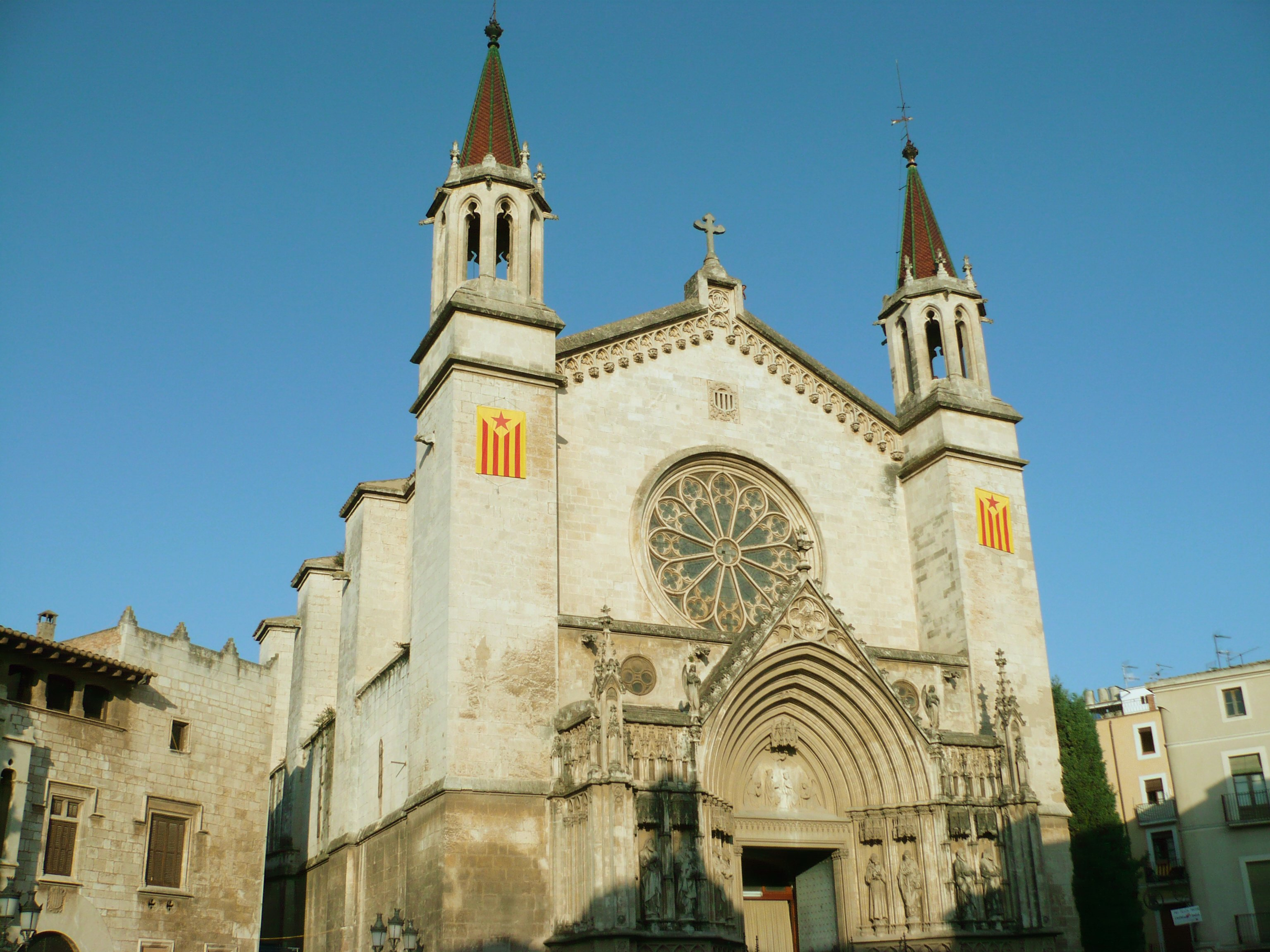 Façana de l'esglèsia de Santa Maria de Vilafranca del Penedès